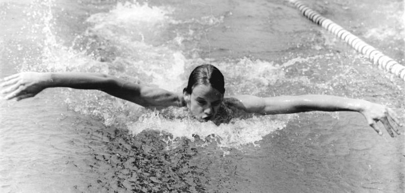 Christian Lietzman ADN-ZB Reiche 6-7-74-Rostock: XXV. DDR-Meisterschaften im Schwimmen (3.Tag)-Mit Abstand bester DDR-Lagenschwimmer ist gegenwärtig der Dresdner Christian Lietzmann (SC Einheit-Foto von einem früheren Wettkampf), der nach seinem Sieg über 400 m nun auch über 200 m mit 2:08,35 min neuen DDR-Rekord schwamm.